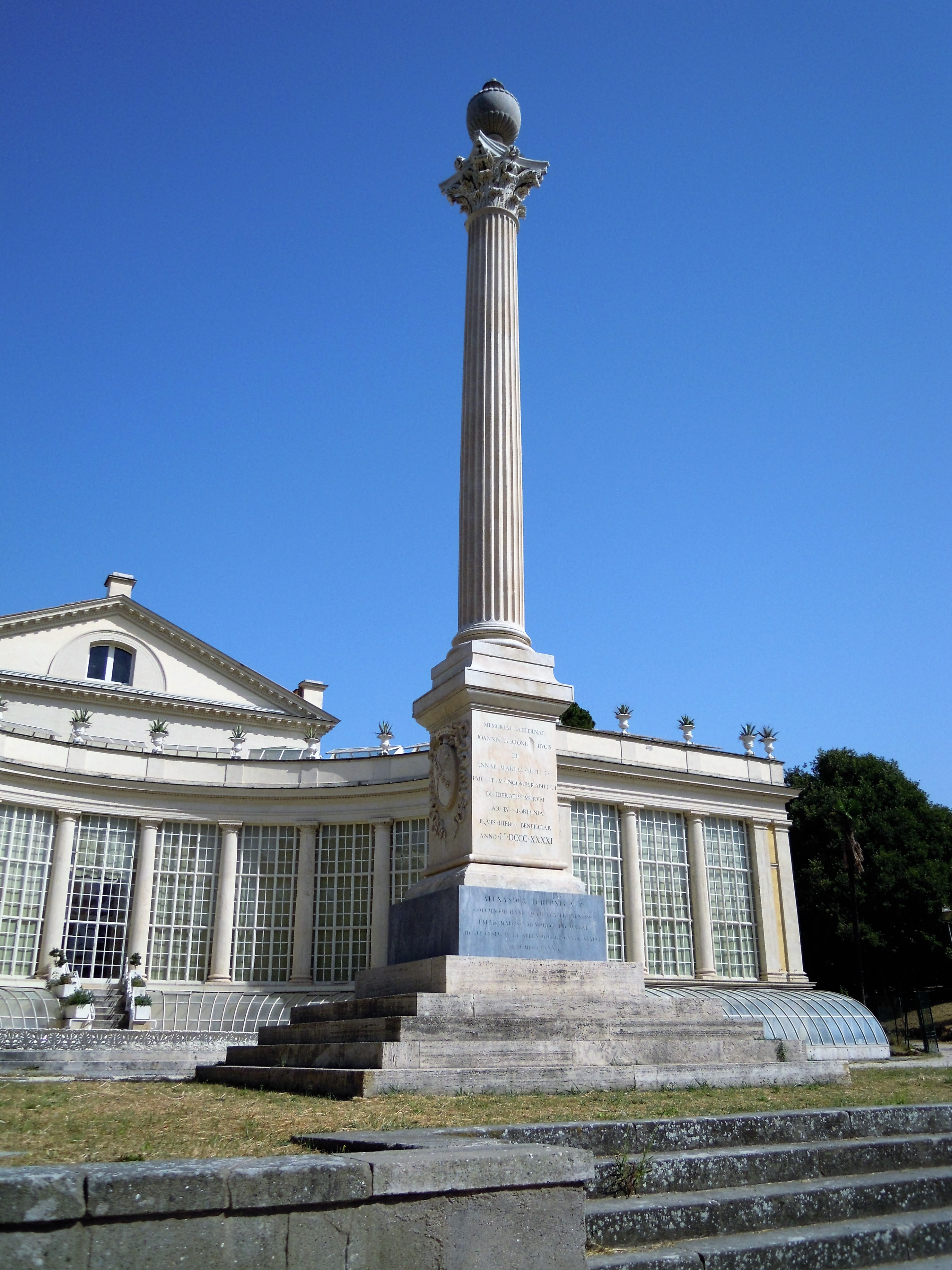 Roma, Villa Torlonia: colonna onoraria fatta erigere da Alessandro Torlonia in memoria dei genitori. Sullo sfondo l'esedra del Teatro